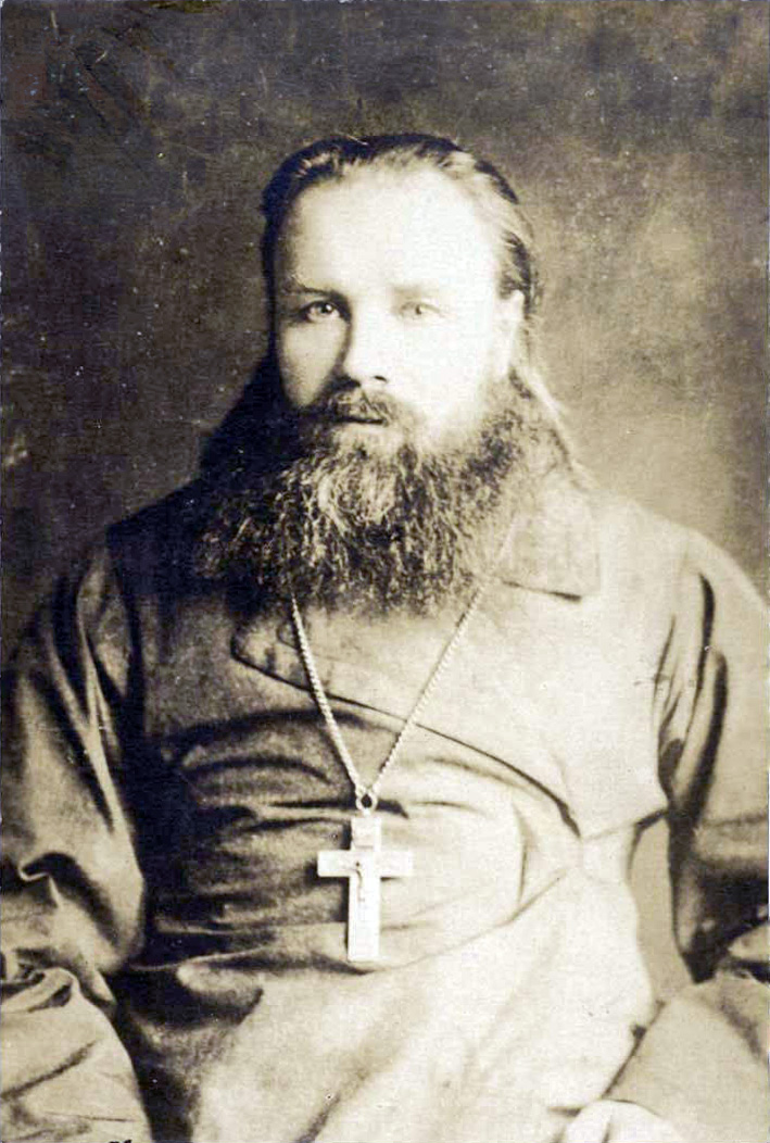 Антон Вакульский, священник (позднее - епископ Амфилохий)